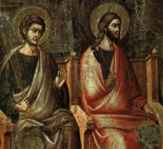 Das letzte Urteil von Pietro Cavallini (1295-1300, Wandmalerei, Santa Cecilia, Trastevere, Rom)